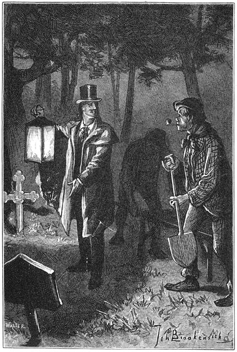 Mark Twains Dutch Translation 'De Lotgevallen van Tom Sawyer' painting from Johan Braakensiek